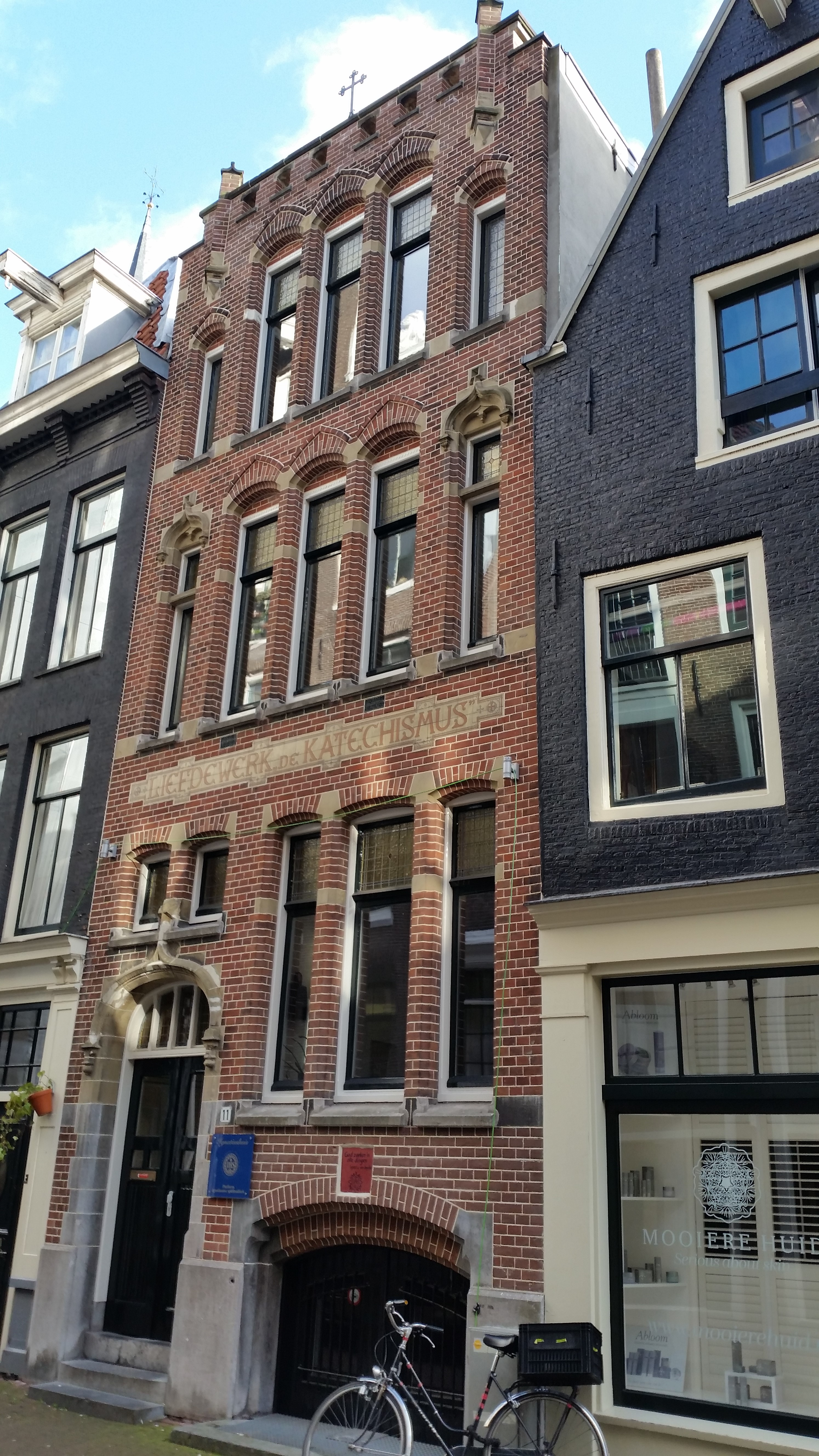 Beulingstraat 11, Amsterdam